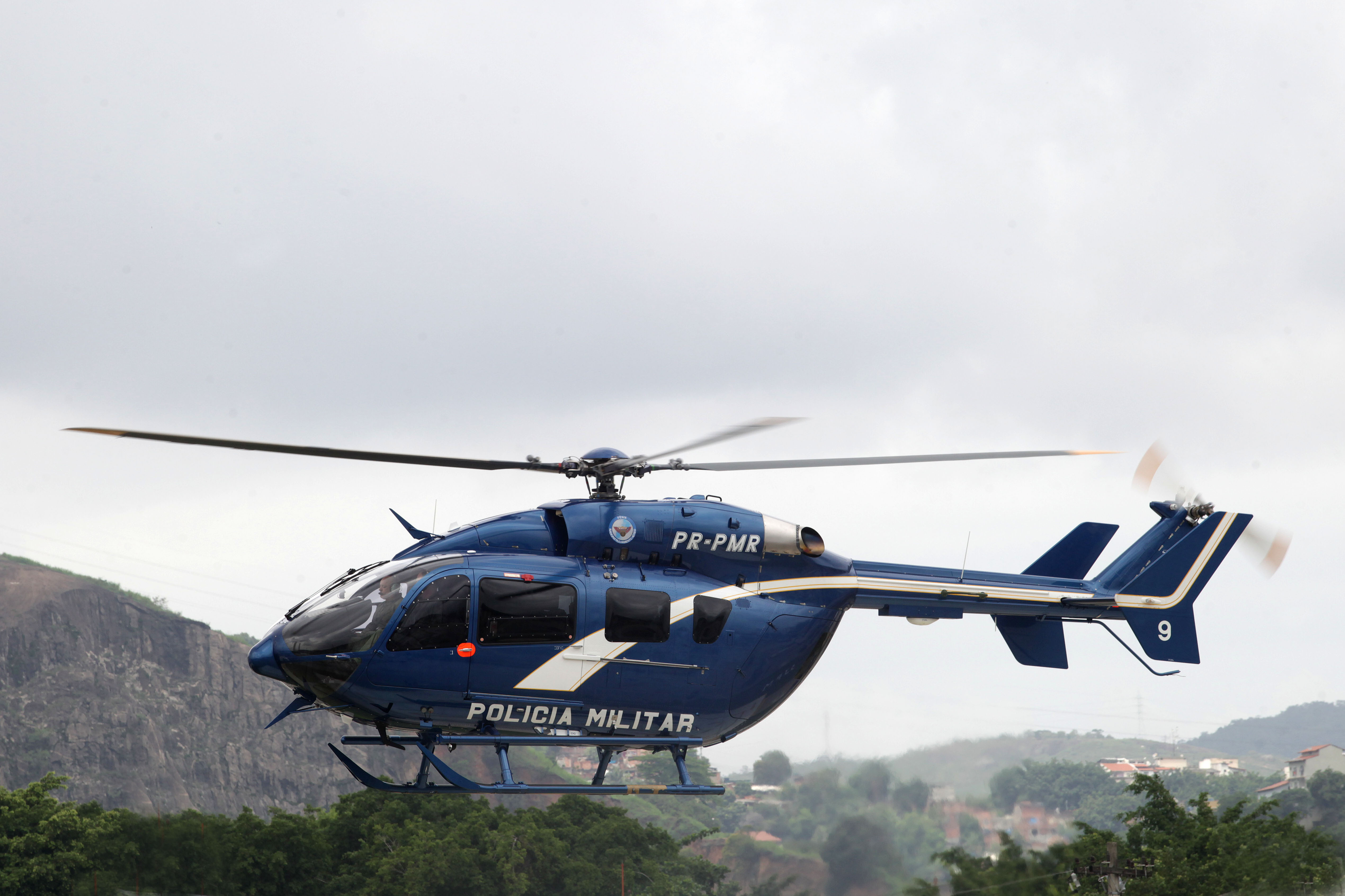 O EC 145, novo helicóptero do Grupamento Aeromóvel da polícia carioca.